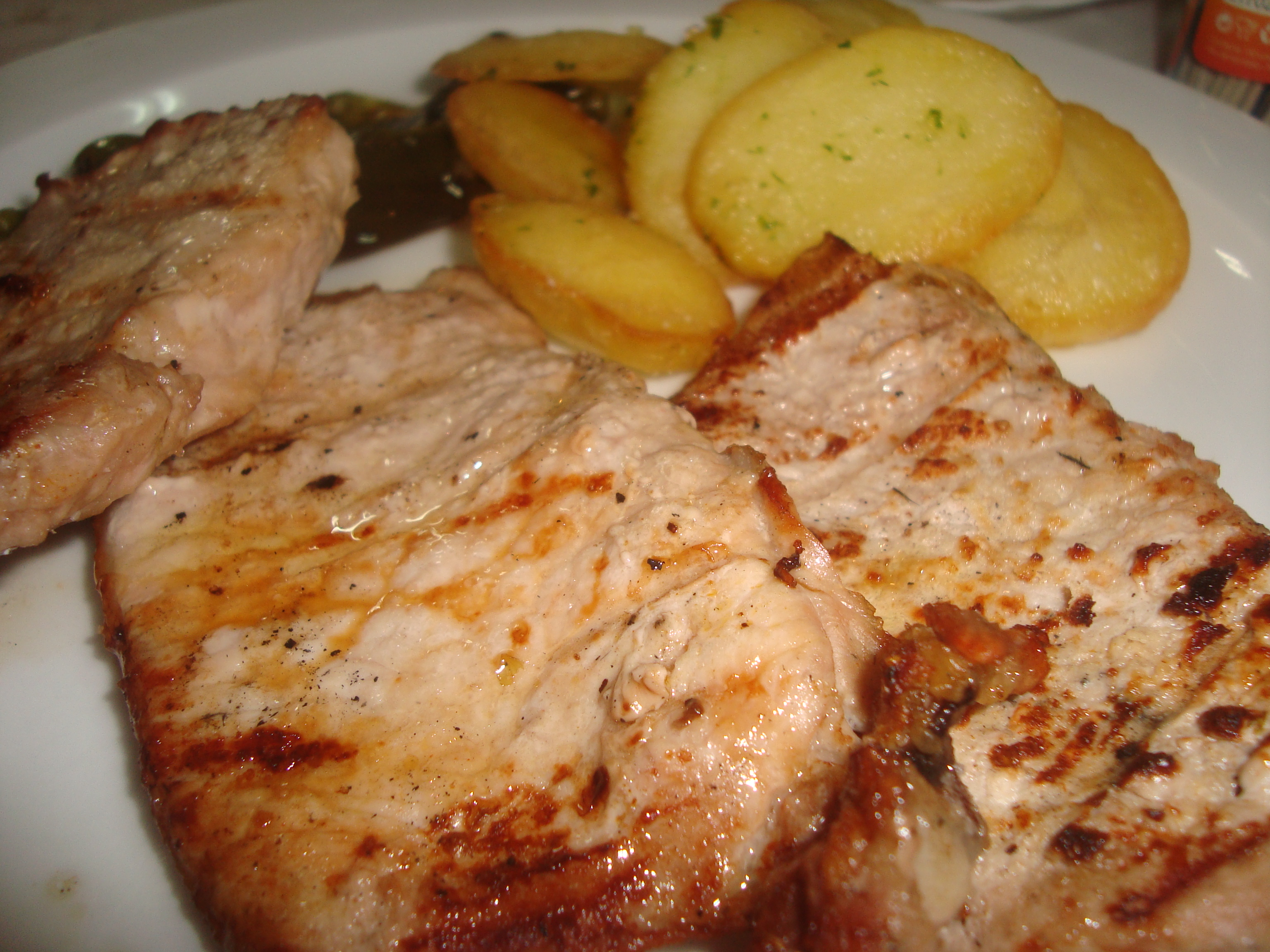 Cinta de lomo a la brasa con patatas